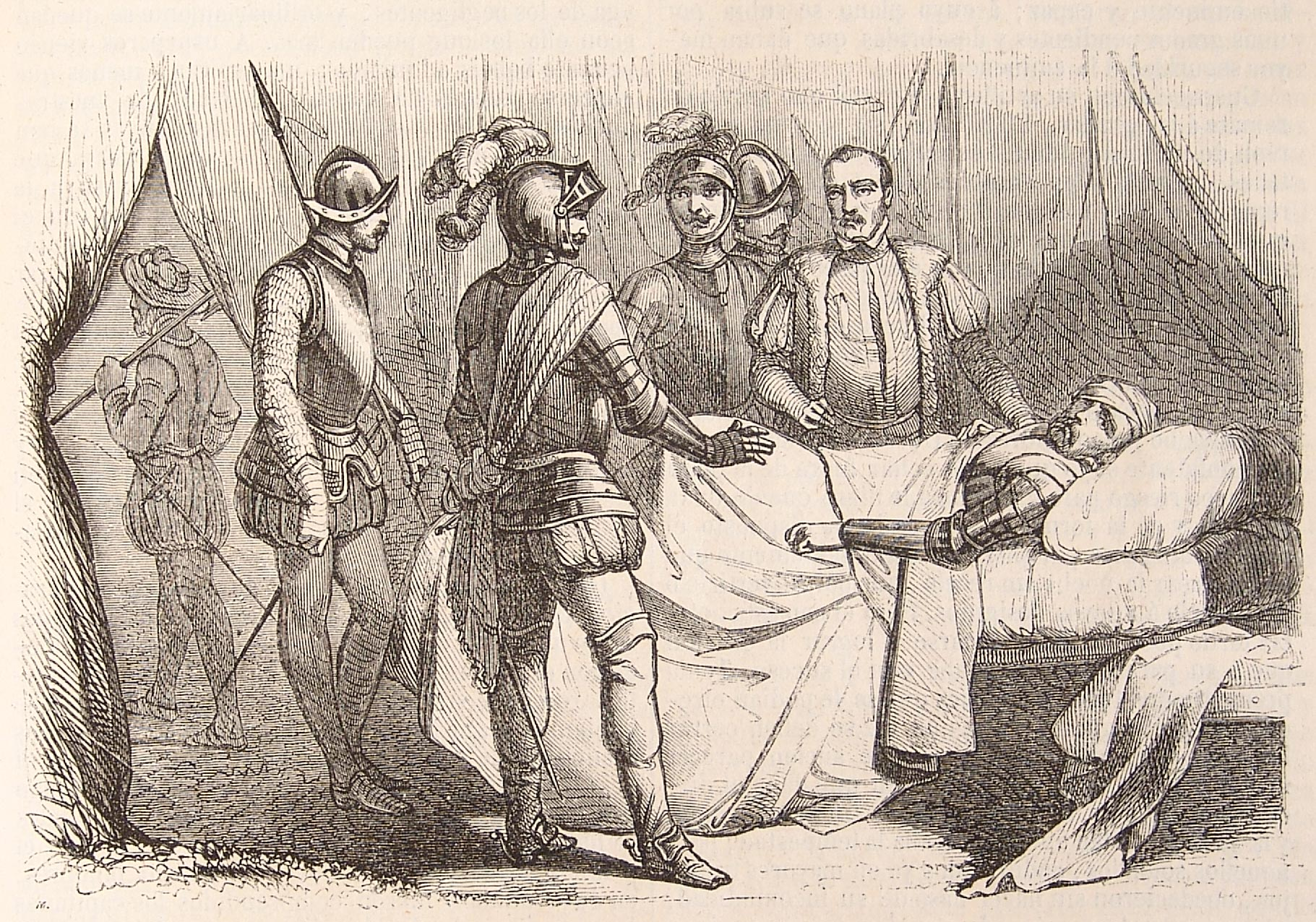 Puede acceder al libro completo en el siguiente enlace : Historia de la conquista de Méjico : población y progreso de la América septentrional, conocida por el nombre de Nueva España / escrita por Antonio Solís. - Madrid : Gaspar y Roig, 1851